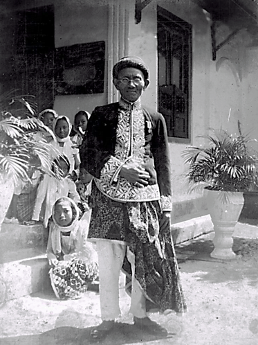 Ketib Anom Kiai Muhammad Sangidu, Kiai Haji Muhammad Sangidu, atau K.R.P.H. Muhammad Kamaluddiningrat (lahir di Kampung Kauman Yogyakarta pada tahun + 1855 dan dimakamkan di Makam Hastorenggo Kotagede ketika meninggal pada tahun + 1940) adalah Kepala Penghulu Kesultanan Yogyakarta ke-13 yang dilantik pada tahun 1914 untuk menggantikan penghulu sebelumnya, yaitu K.R.P.H. Muhammad Khalil Kamaluddiningrat.